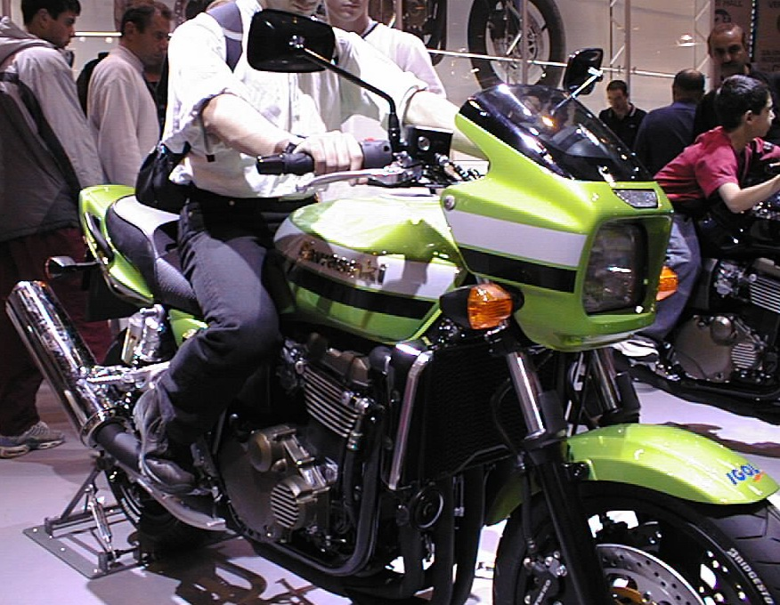 Kawasaki ZRX 1200R - Mondial du deux roues de Paris, 2003.